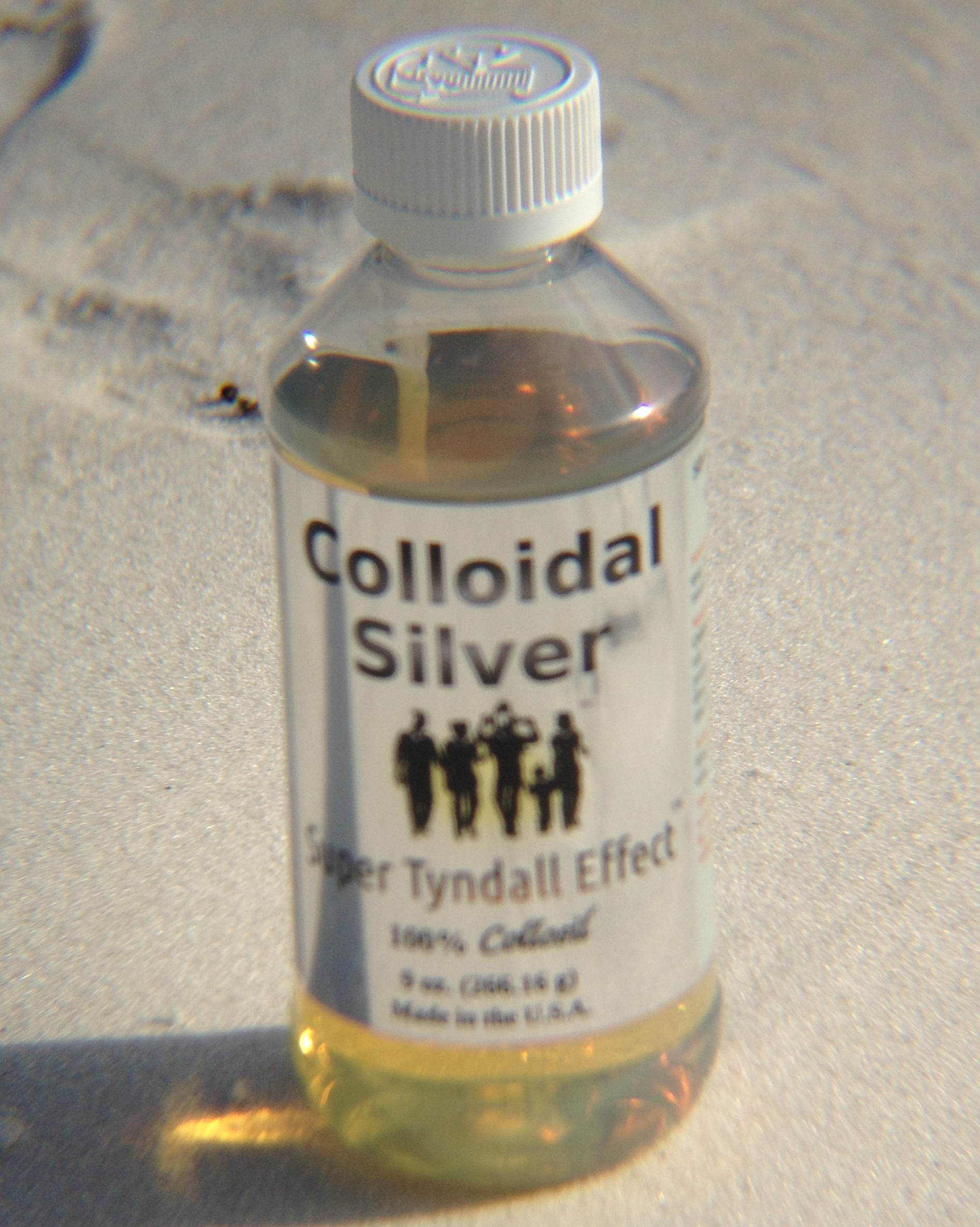 Botella de 9oz de plata coloidal Super Tyndall Effect